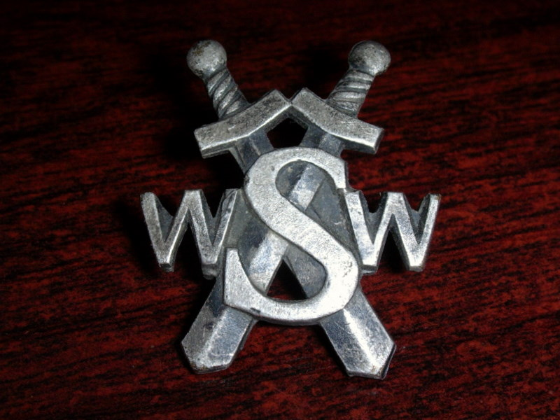 Prawdziwa odznaka WSW, przeleżała 20 lat w szufladzie :)